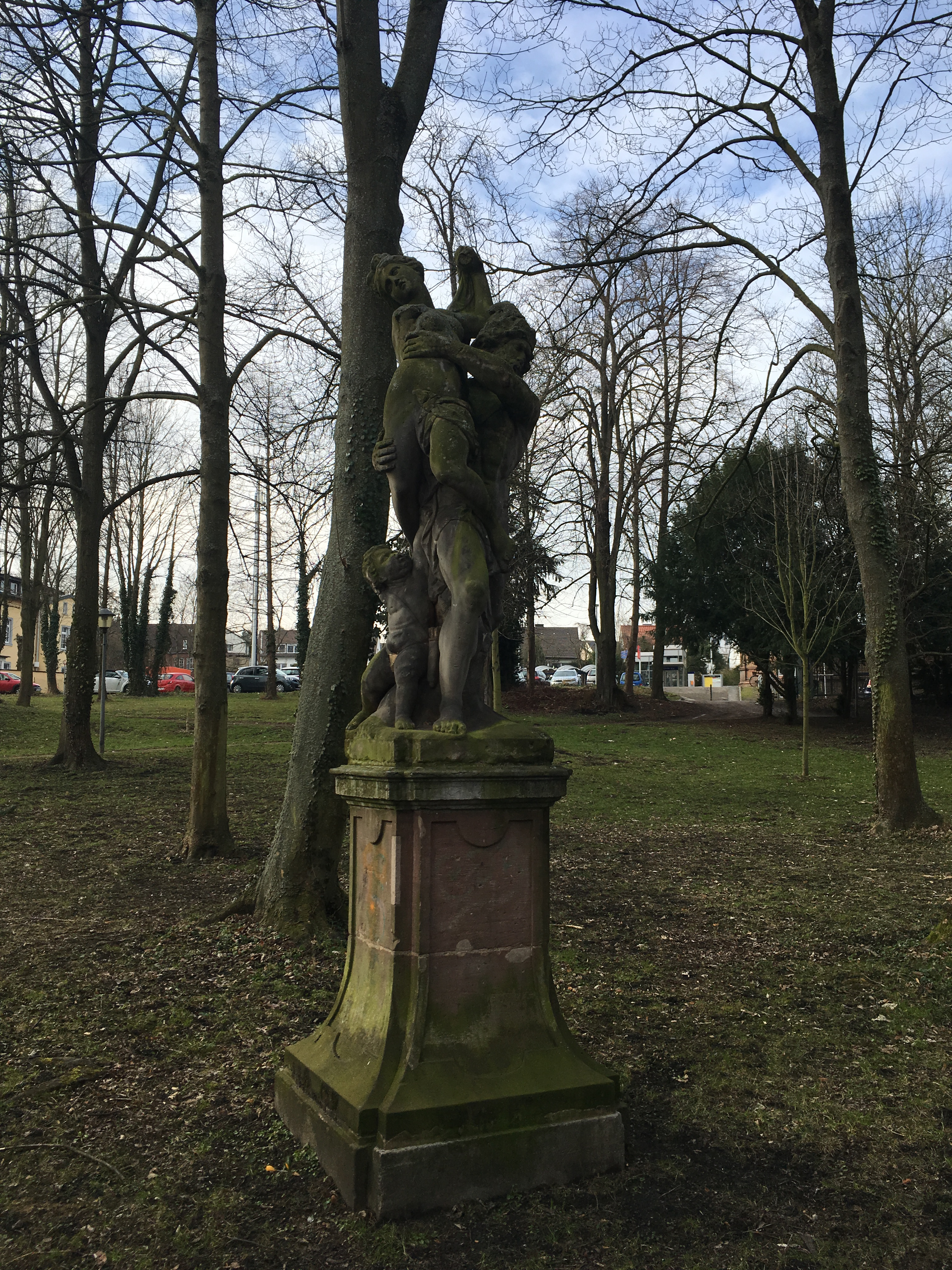 Kierberger Bahnhofspark, angelegt in den 1870er Jahren gemeinsam mit dem Kaiserbahnhof in Kierberg, einem Ortsteil der Stadt Brühl im Rhein-Erft-Kreis in Nordrhein-Westfalen